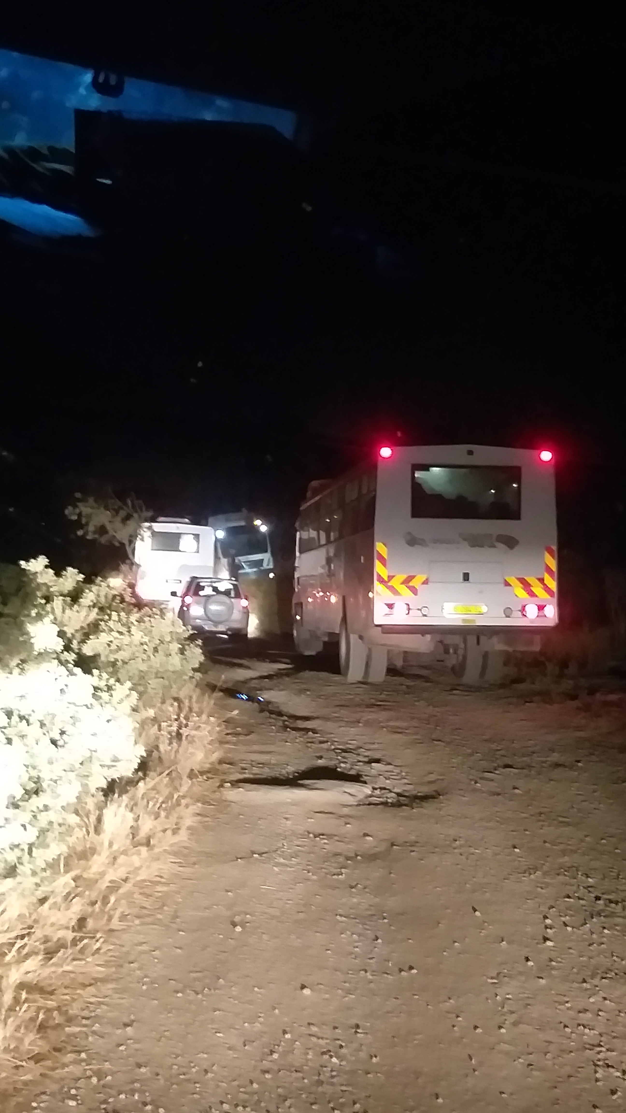 תרגיל לילי 2020